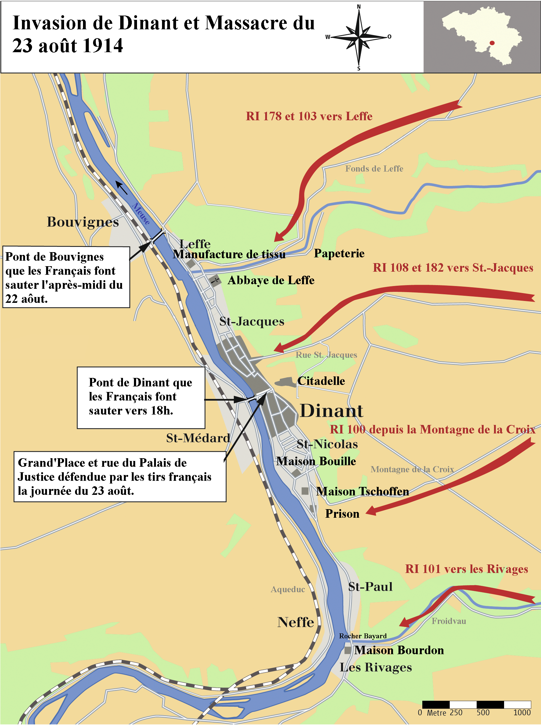 Invasion de Dinant - 23 août 1914